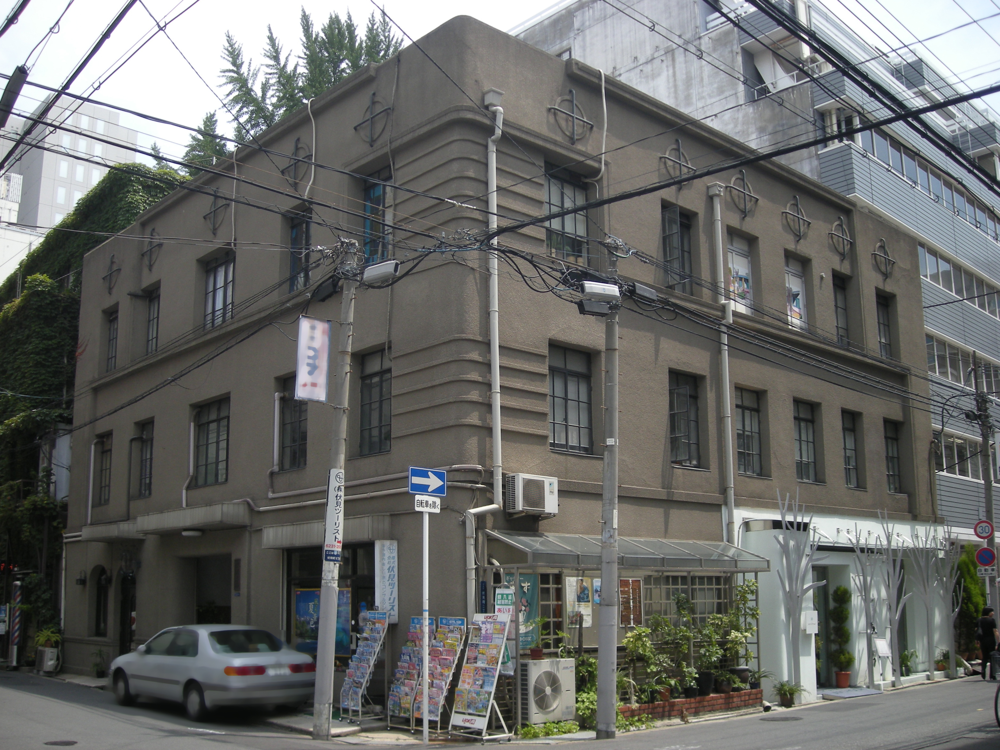 伏見ビル 大阪市